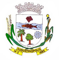 Brasão de Augustinópolis